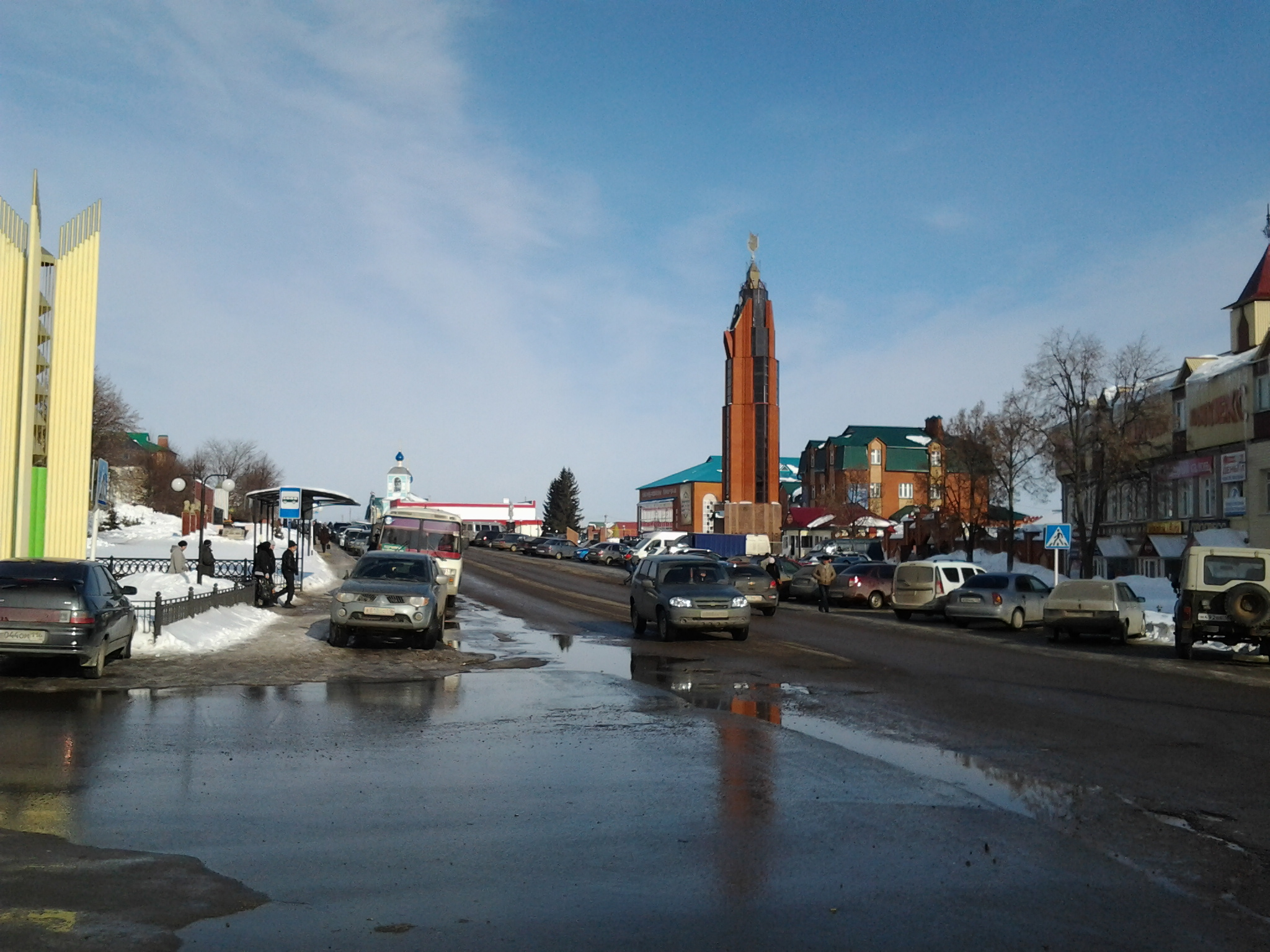 Татарча/tatarça: Арча, Совет мәйданы